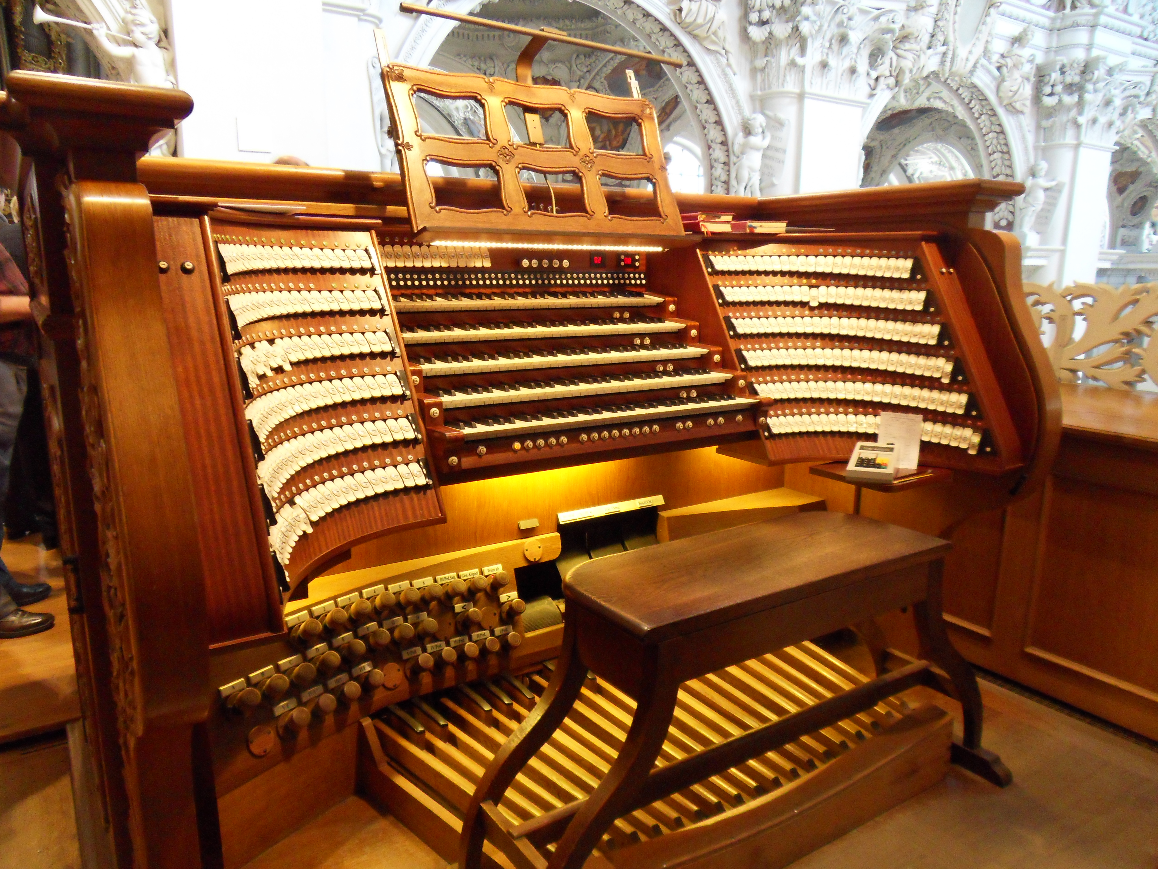 Zentralspieltisch der Passauer Domorgel. Von ihm aus können alle 5 Orgeln und alle 233 Register mit den insgesamt 17974 Pfeifen angespielt werden.